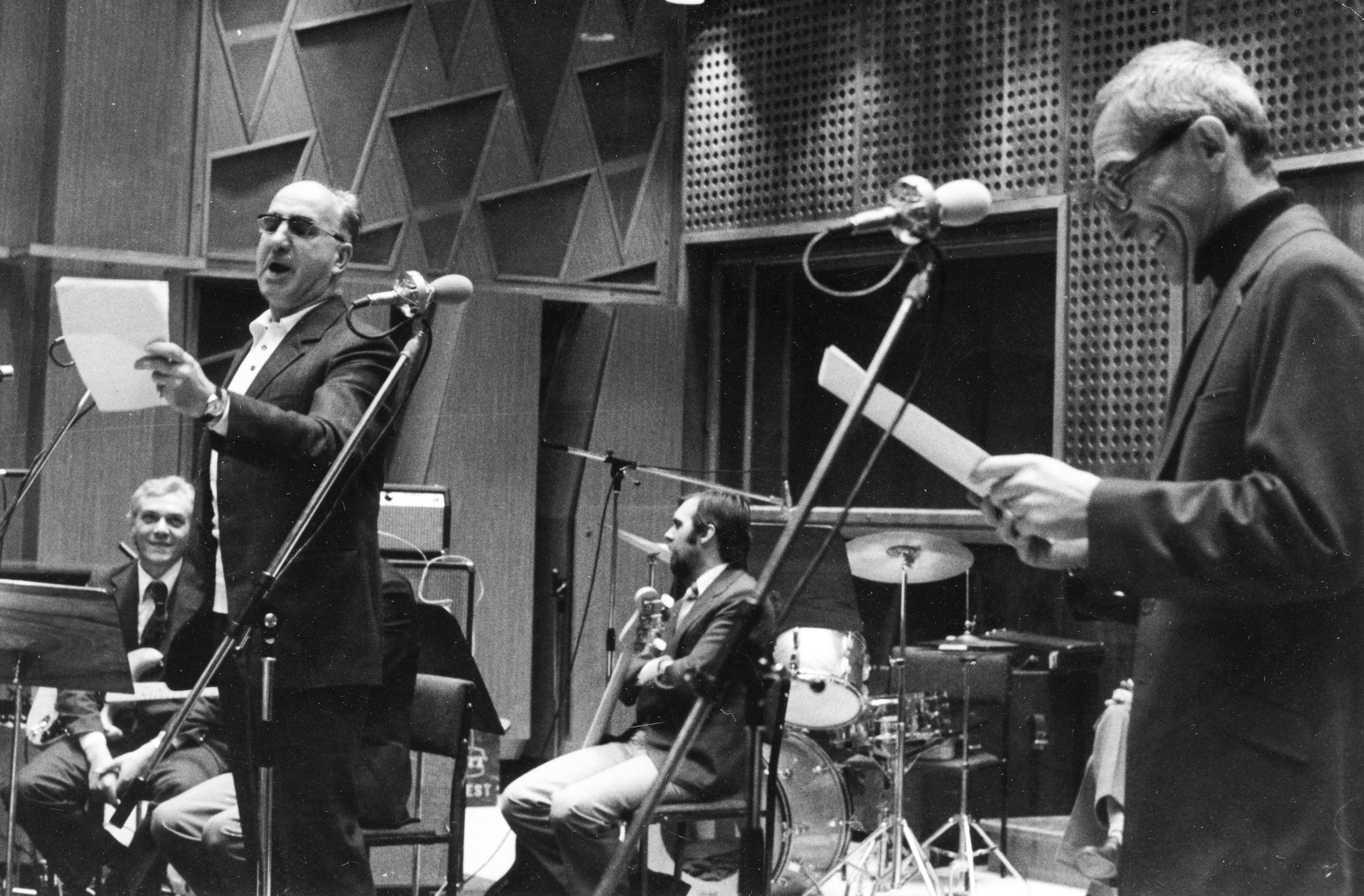 a Magyar Rádió stúdiója, Melis György operaénekes és Peterdy Pál humorista. Location: Hungary, Budapest VIII. Tags: Hungarian Radio, Budapest Title: a Magyar Rádió stúdiója, Melis György operaénekes és Peterdy Pál humorista.